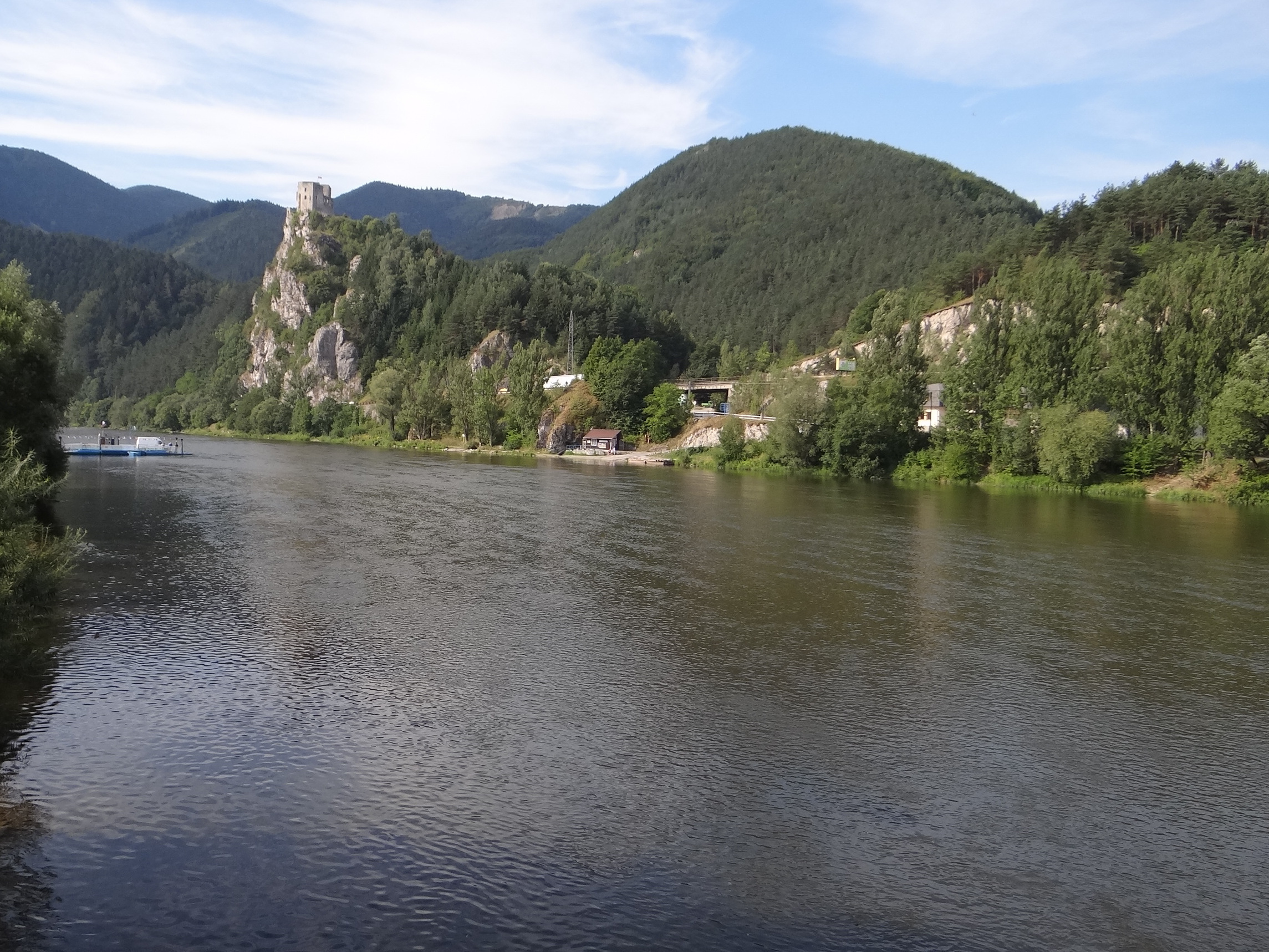 Váh from Strečno